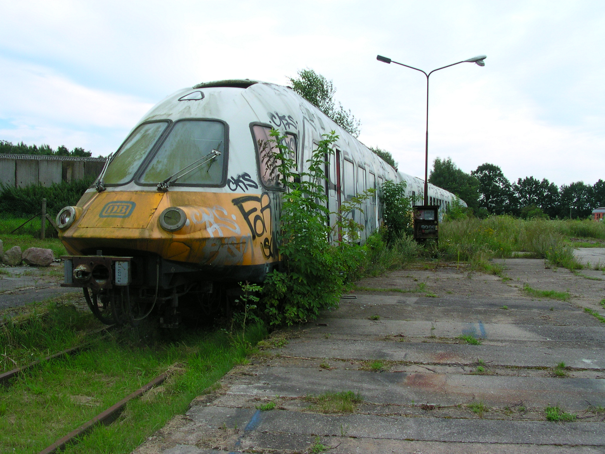 DB-Baureihe 403, Triebwagen 403-001-1, abgestellt am Bahnhof Putlitz an der Strecke Richtung Pritzwalk